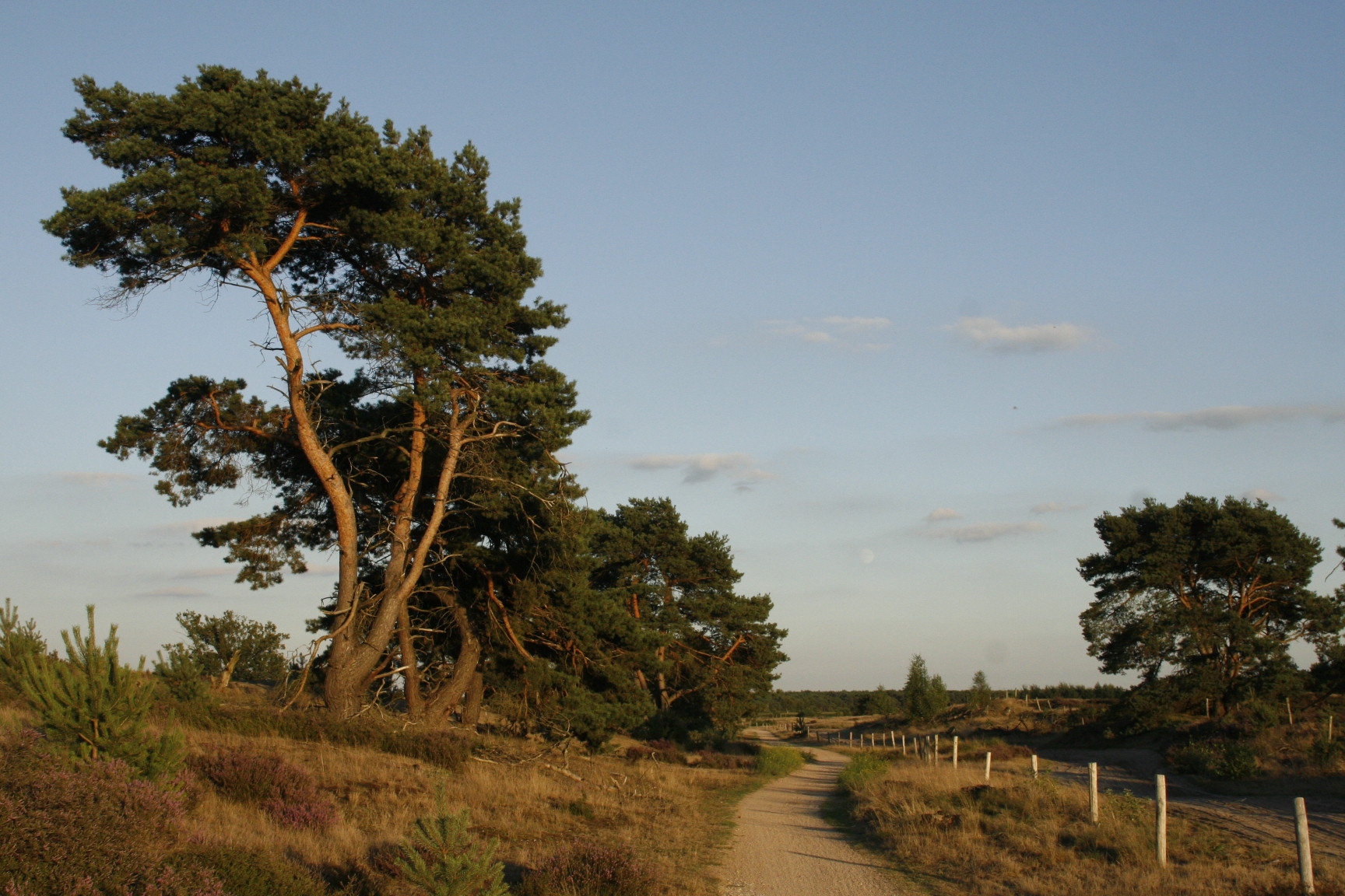 Jonge en volgroeide vliegdennen op de Groote Heide Bij Leende.